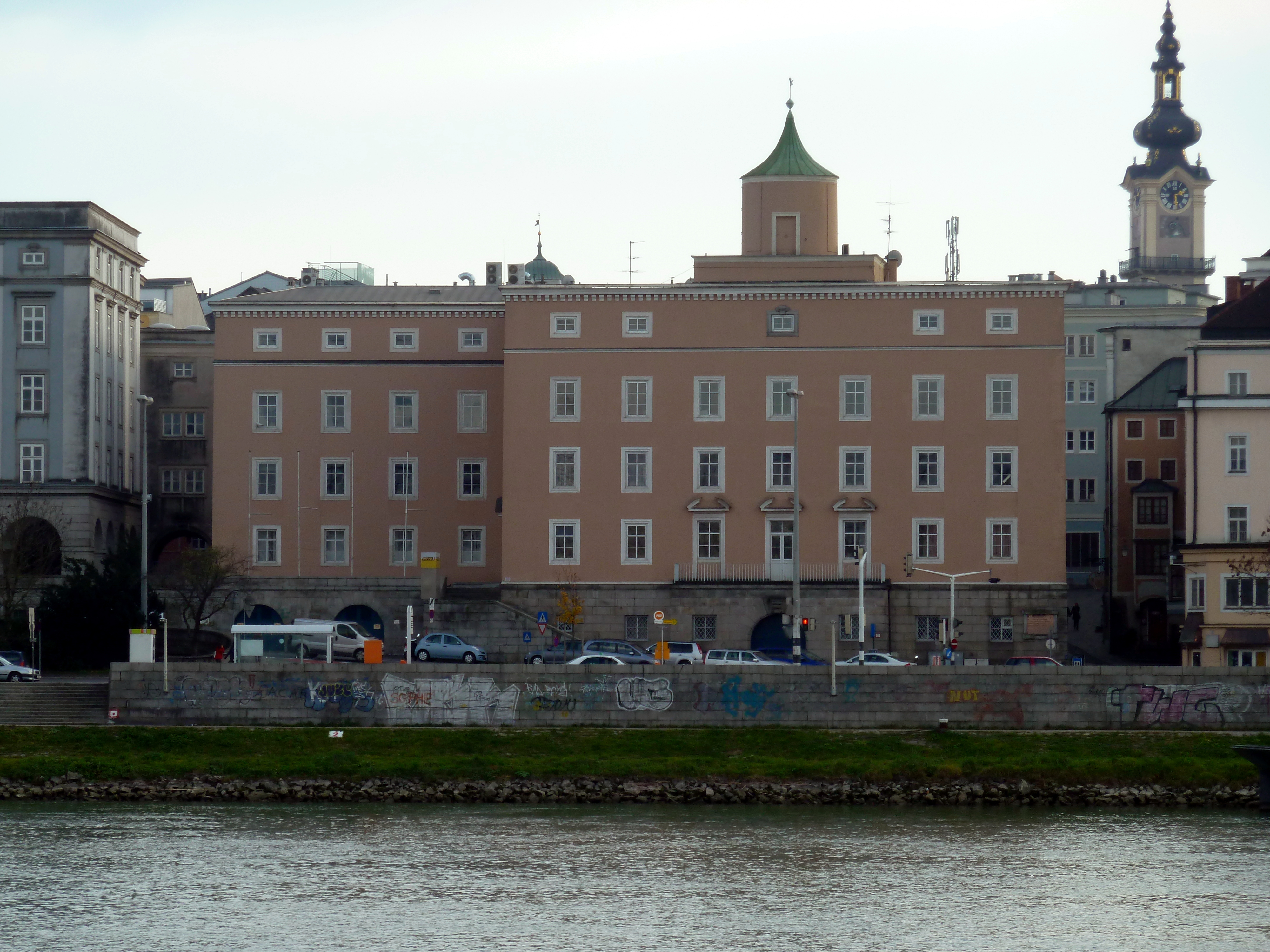 Ehem. Wasserstraßenamt, Heinrich-Gleißner-Haus